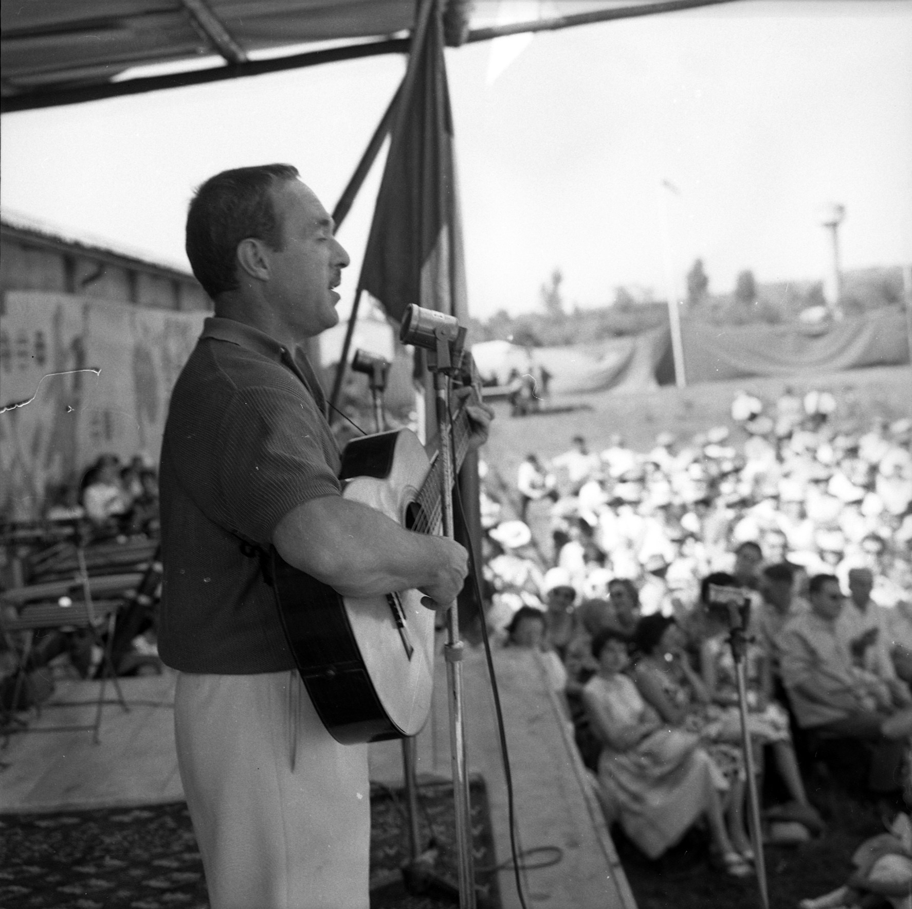 Noé (Haute-Garonne). 9 juillet 1961. Portrait de profil du chansonnier Jacques Esterel chantant en jouant de la guitare sur scène à l'occasion de l'election de la "Belle Gaillarde". Au second plan le public. Observation: "La Belle Gaillarde" est une éléction de miss qui a été créée à Noé (Haute-Garonne) durant l'été 1960 par Jacques Esterel, chansonnier et couturier, et Jean-Baptiste Doumeng, homme d'affaire et maire de Noé. L'élection de 1961 s'est déroulée du 8 au 10 juillet.